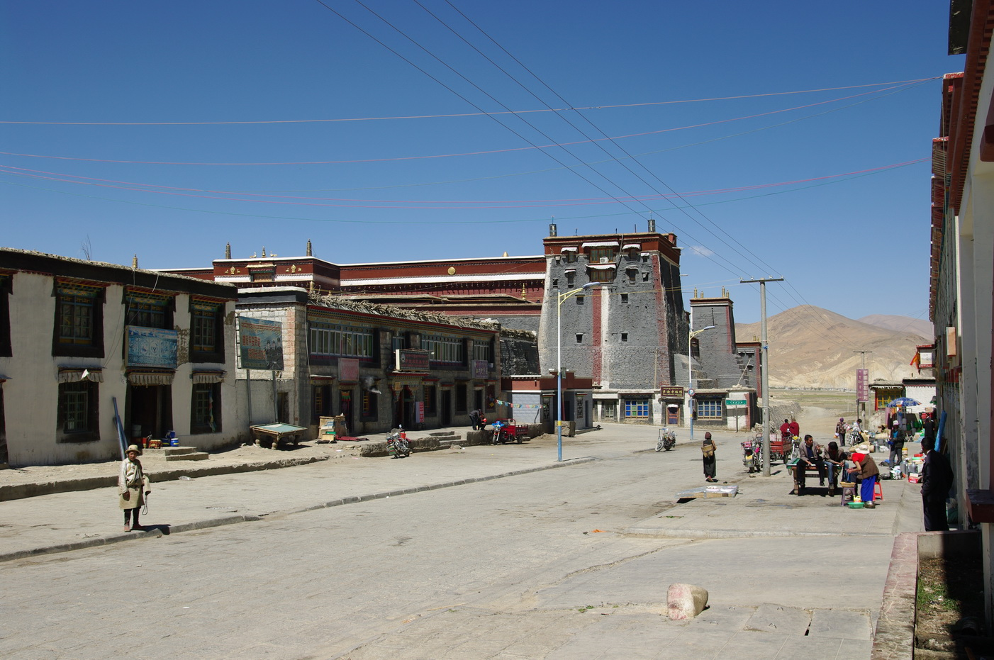 Straße zum Südkloster Sakya